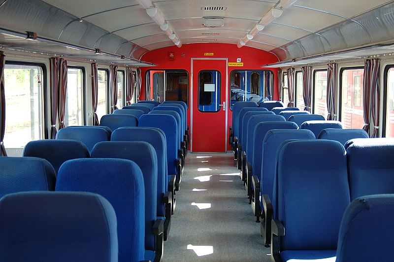 Interior of Vestsjællands Lokalbaner Lynette Control Car Ys259 (former Skagensbanen)